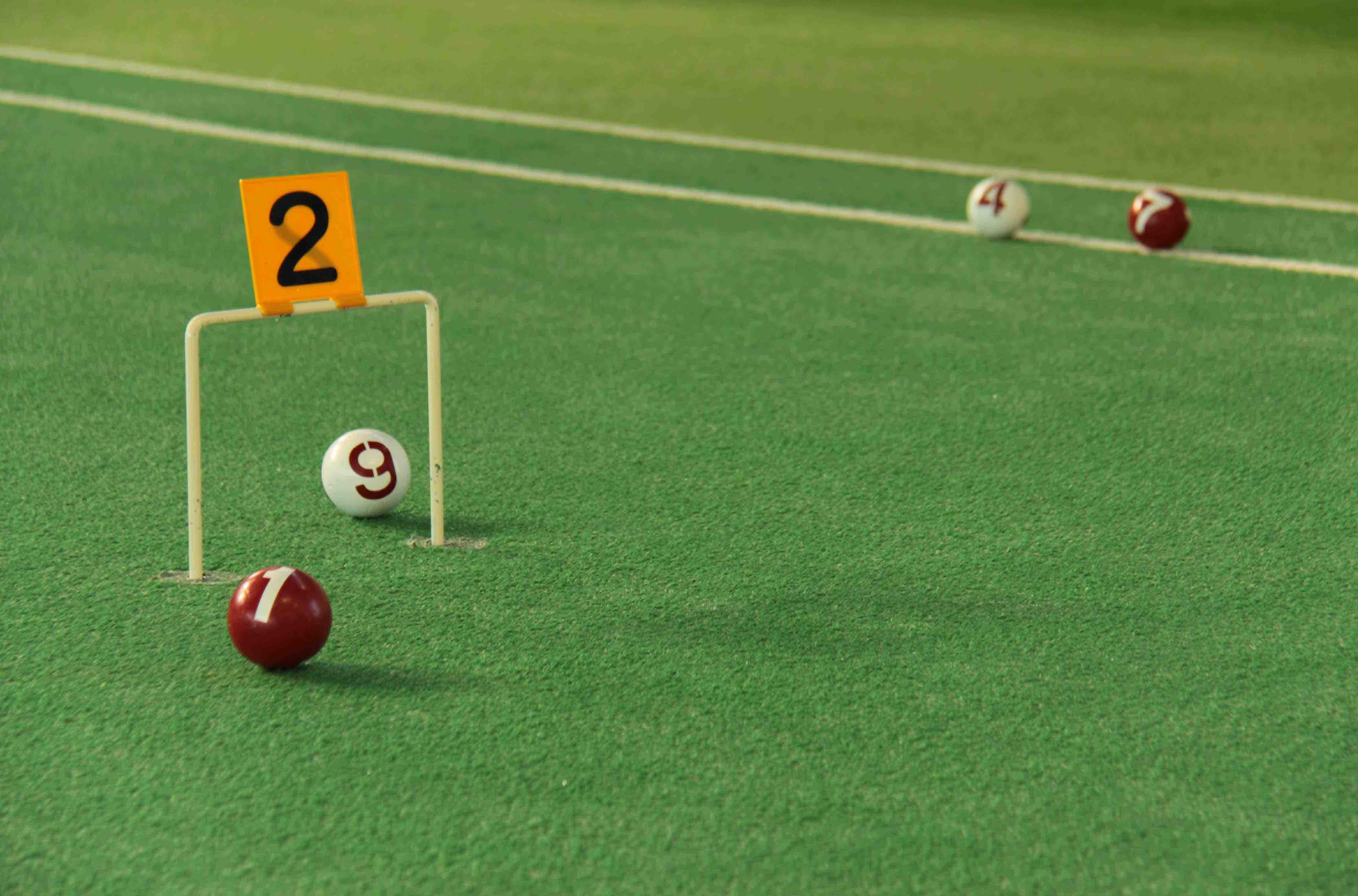 ゲートボールのコートの雰囲気、ボールとゲート